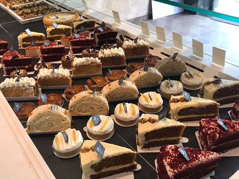 حلويات مغربية تصوير بكاميرا سعيد الجمالي